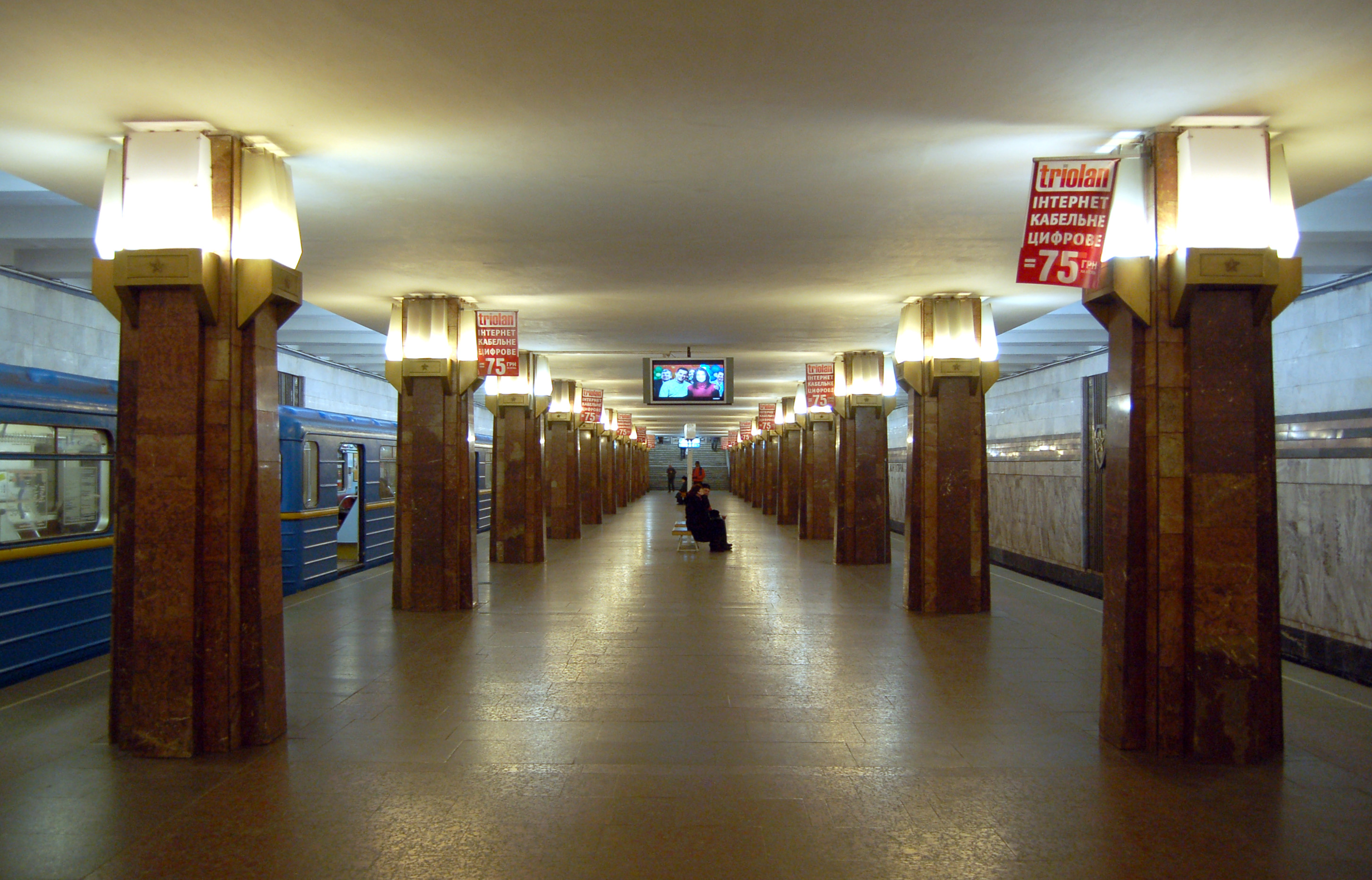 Cтанция метро «Героев Днепра», интерьер станции